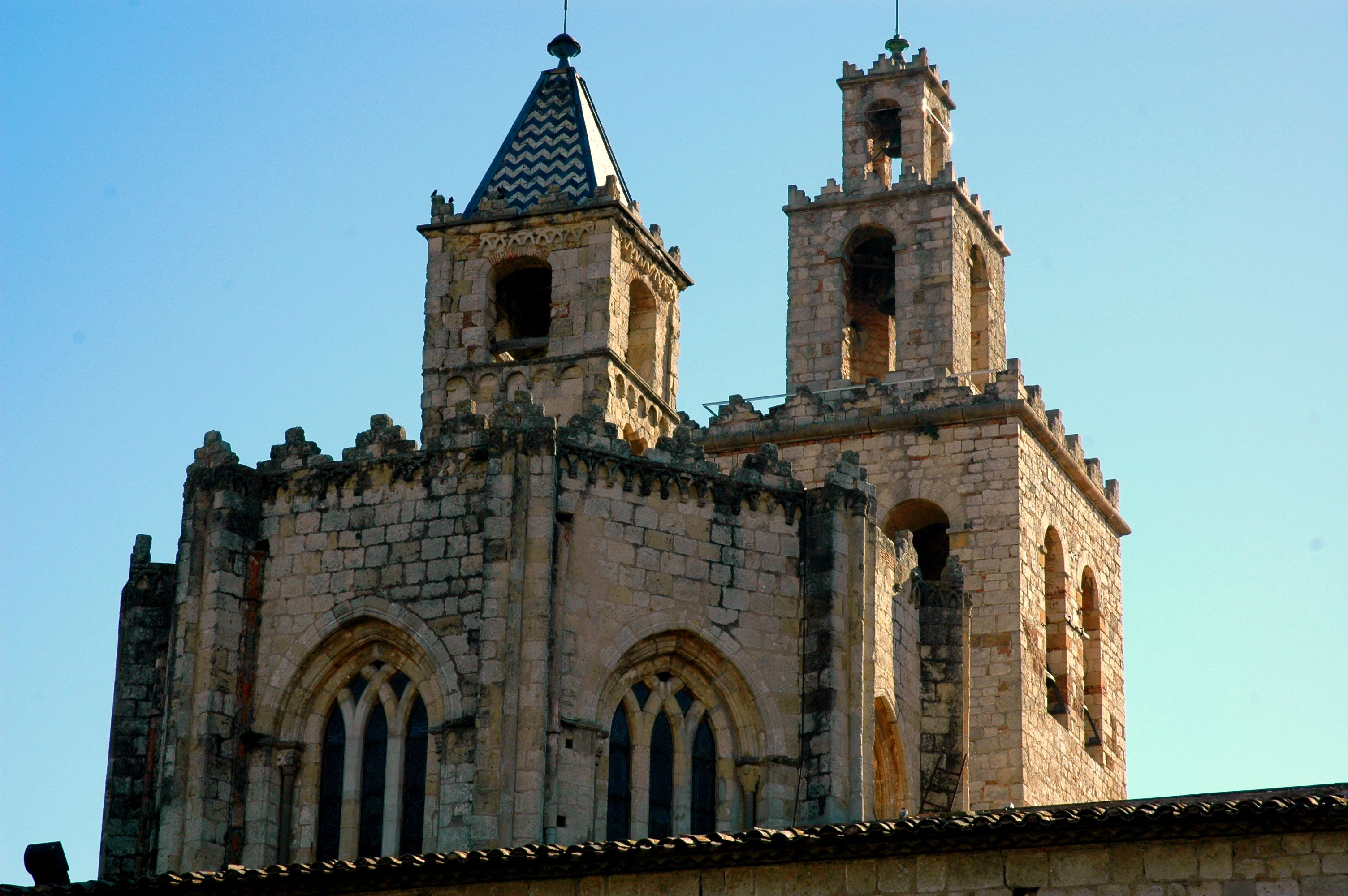 Monestir de Sant Cugat - Cimbori